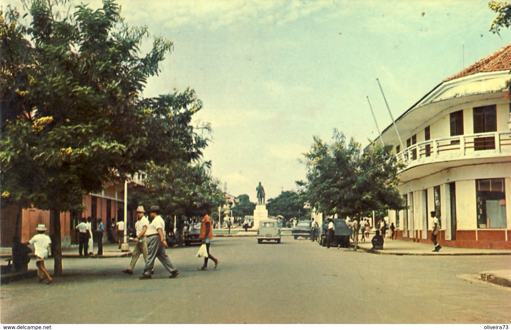 Postcard: Foto Serra No 129 - Avenida Carvalho Viegas - Bissau